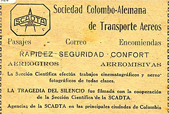 Annonce du film "La tragedia del silencio" parue dans la revue Cine Colombia en mai 1924